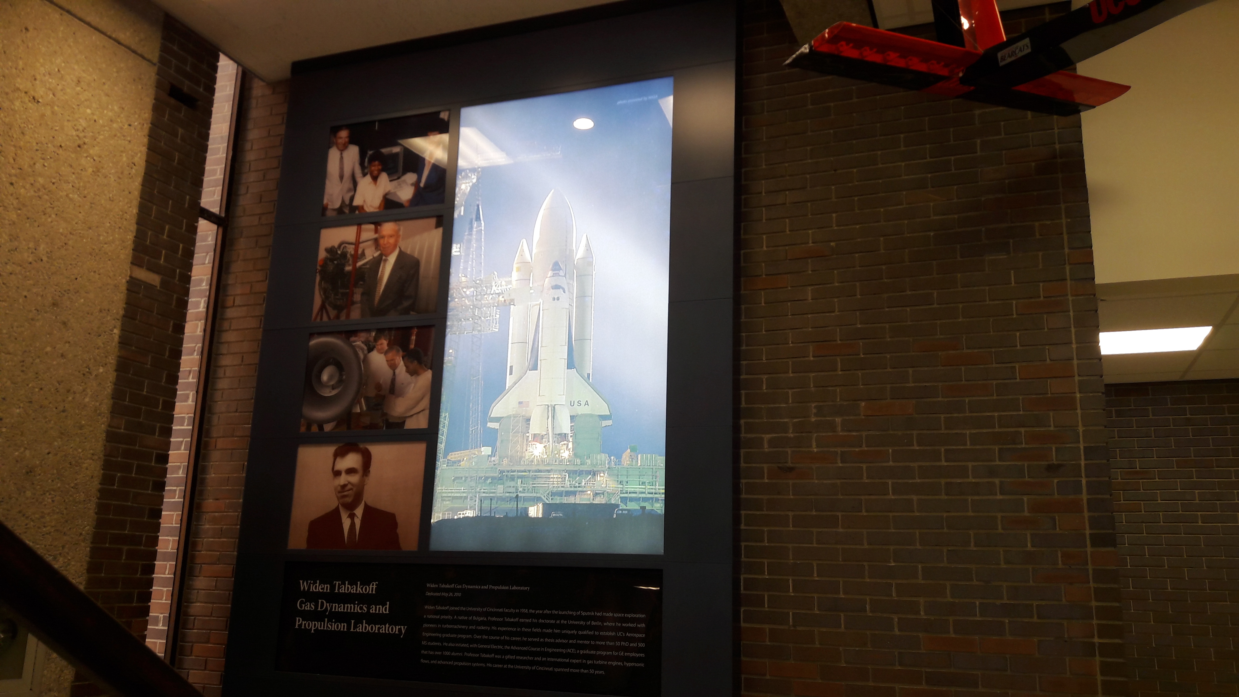 Пано на входа на сградата в университета в Синсинати, въдето е преподавал проф. Табаков